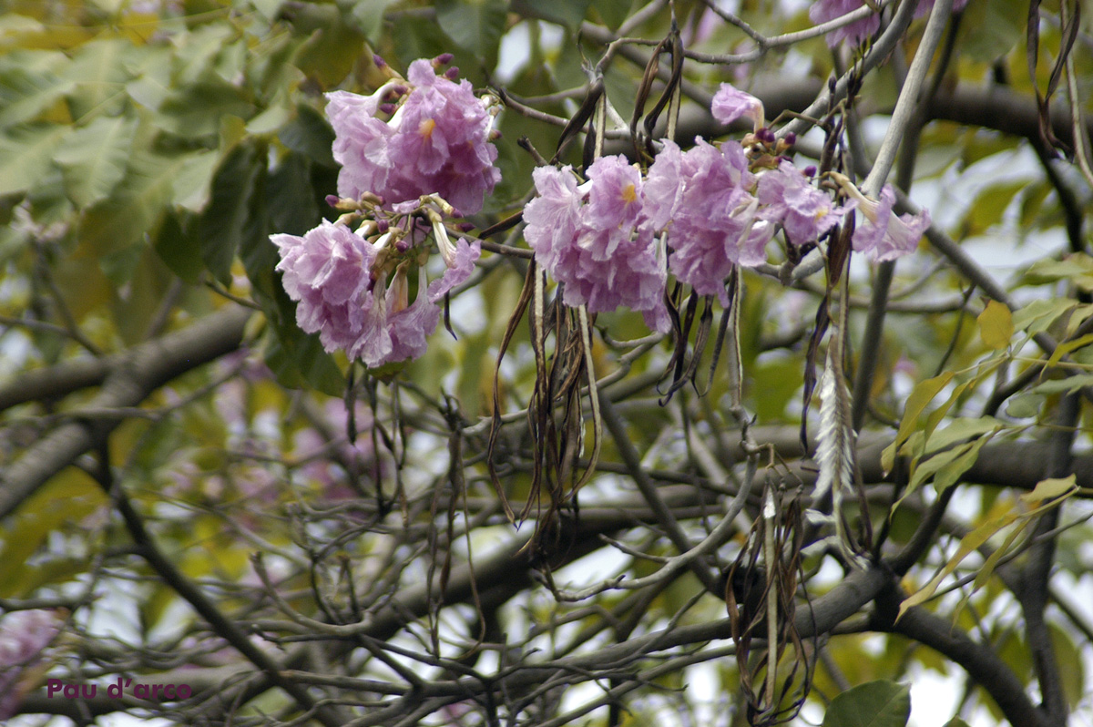 Pau d'arco roxo